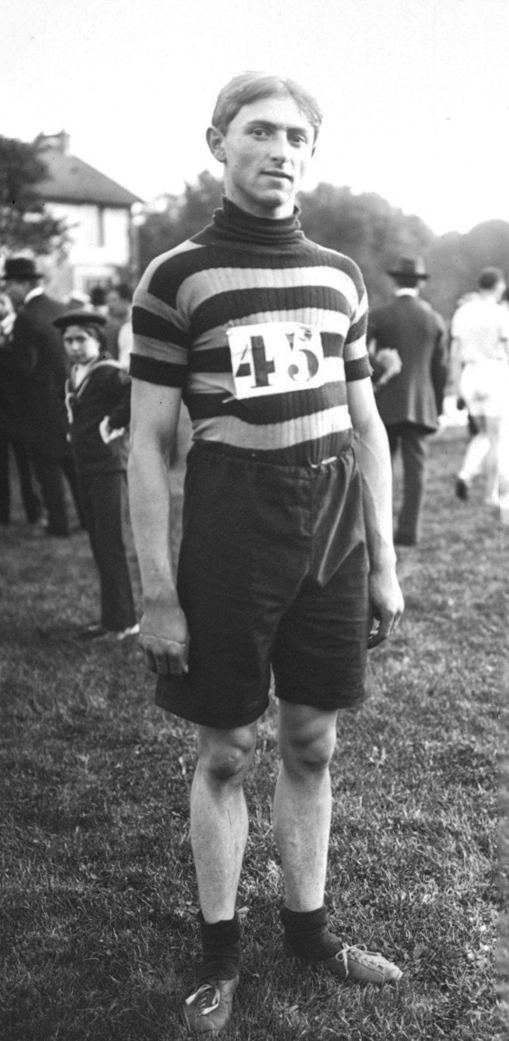 [28-9-13, Bois de Boulogne, Pavillon des Princes] Devaux gagnant du 400 mètres : [photographie de presse] / [Agence Rol]